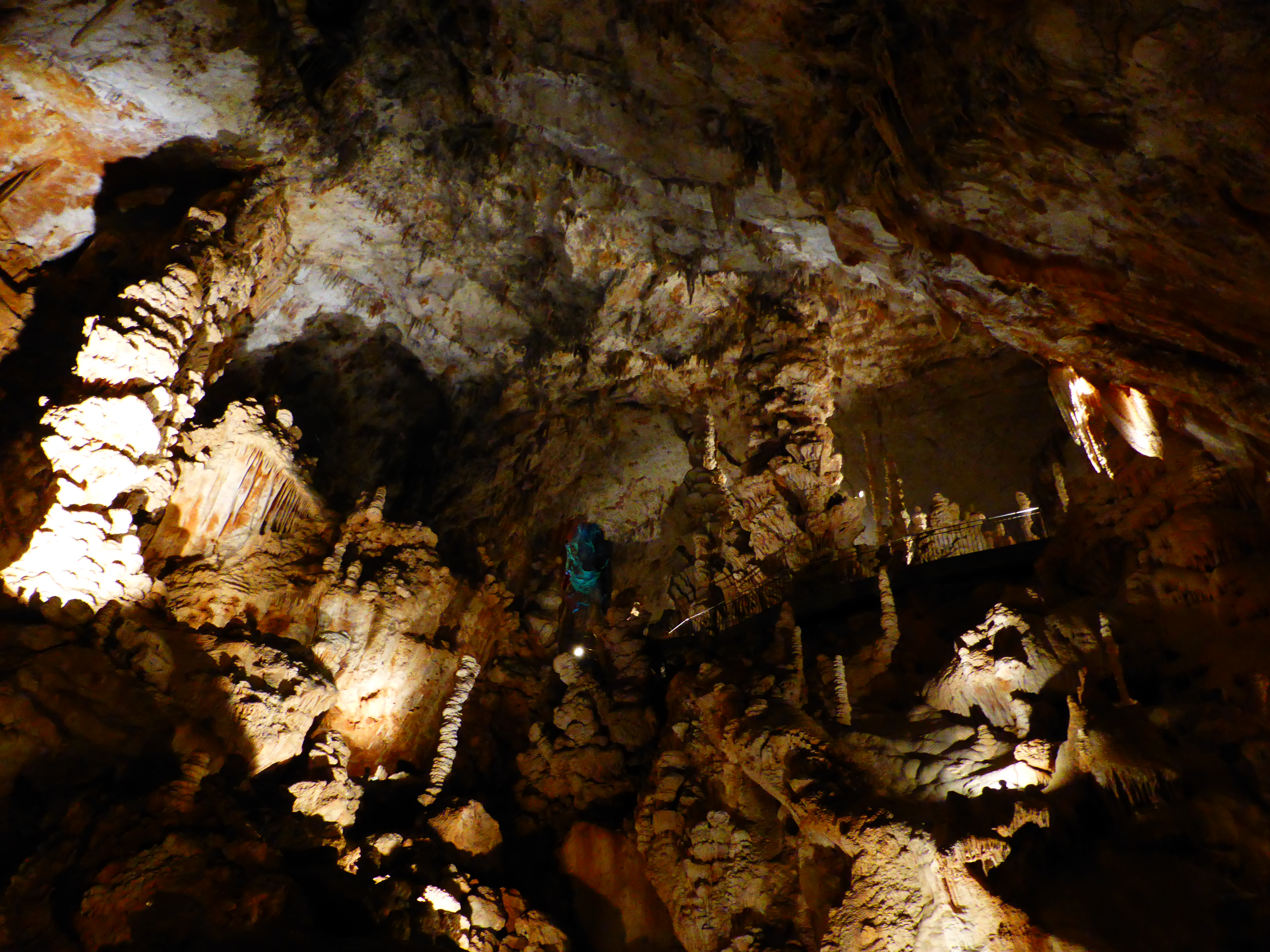 Intérieur de la grotte de l'Aven d'Orgnac en Ardèche. Pris dans la partie N-O de la salle Petit ("salle du Chaos"), regardant vers le haut et vers la salle Joly. La tache bleue est la lumière provenant du puits Bertras (l'entrée originelle).